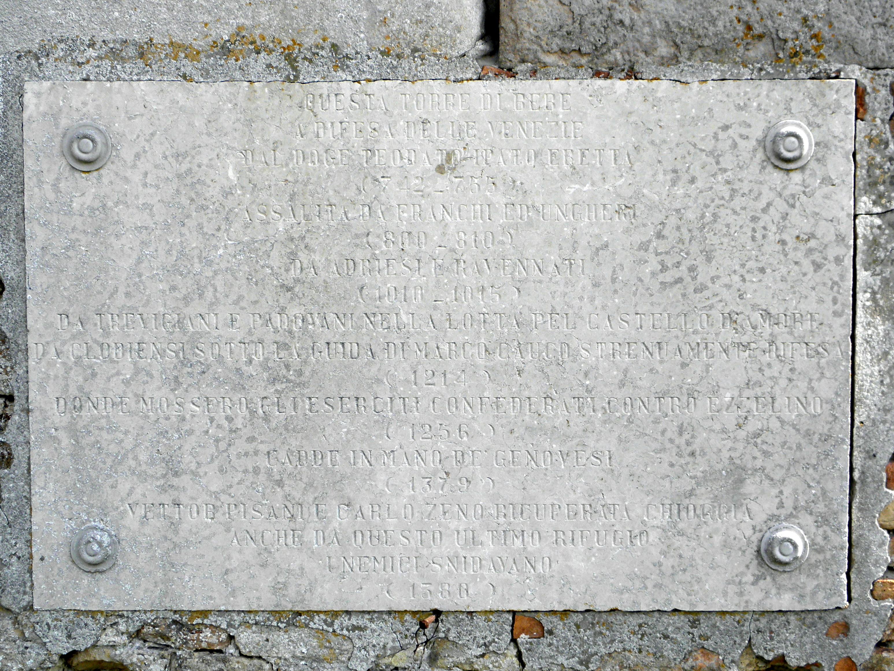 Cà Bianca, frazione di Chioggia: la lapide commemorativa posta sui ruderi della Torre di Bebe (o Torre delle Bebbe).